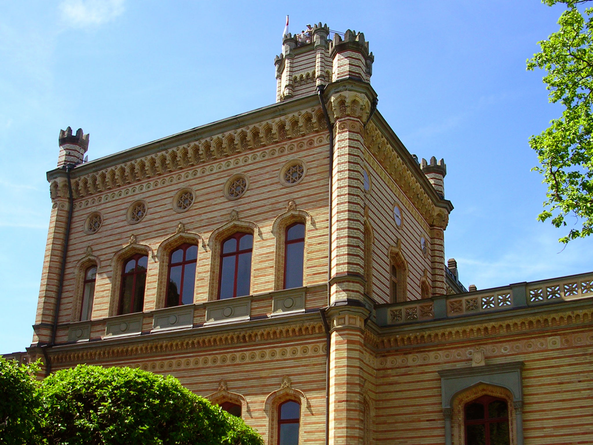 Schloss Montfort in Langenargen